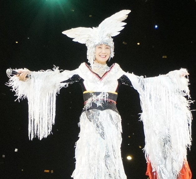 被写体である本人の了解も得ての撮影画像になります。 またウィキメディア・コモンズへのアップロードも許可済みです